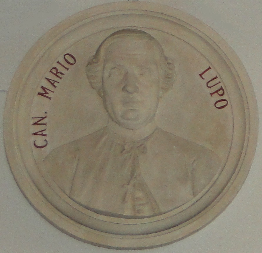 Mario Lupo, storico italiano. Medaglia presso Biblioteca Angelo Mai di Bergamo